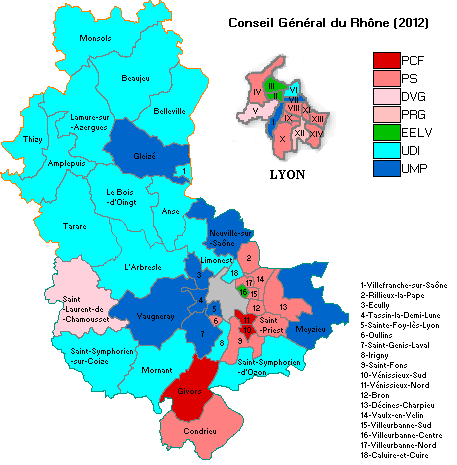 Couleur politique des cantons du Rhône à la date du 9 octobre 2012